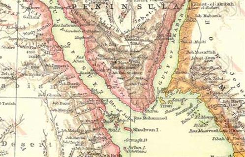 جزء من خريطة لمصر والسودان يوضح تبعية جزيرتي صنافير وتيران لشبه الجزيرة العربية. Part of a historical map shows Tiran and Sanafir is part of the Arabian Peninsula.